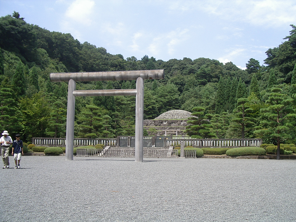 Imperial Mausoleum - Shōwa emperor(昭和天皇)'s grave